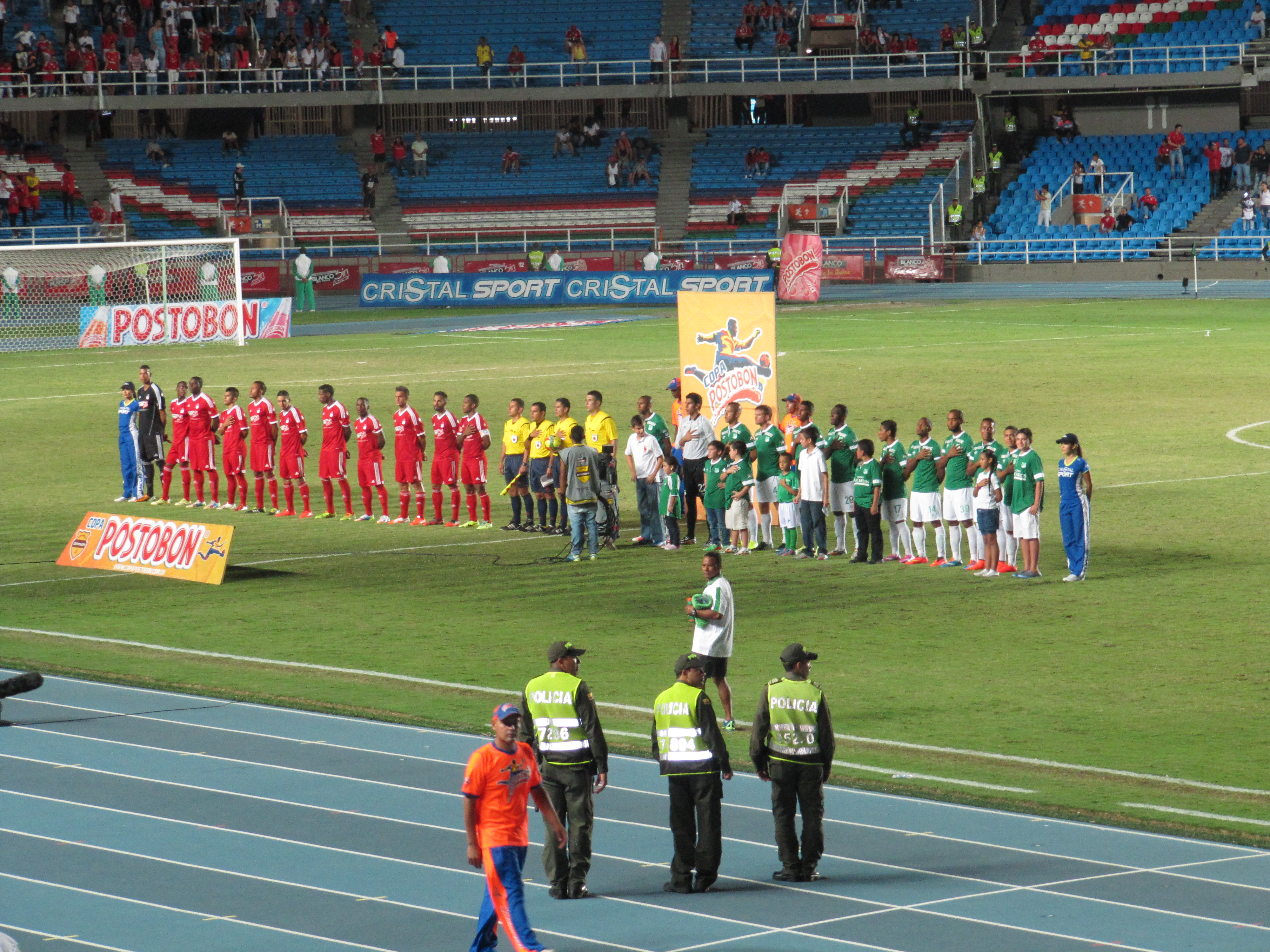 Partido entre el Glorioso Deportivo Cali y el américa, 2do ex-clásico de la Copa Colombia 2014 cuyo resultado fue un empate a 0.